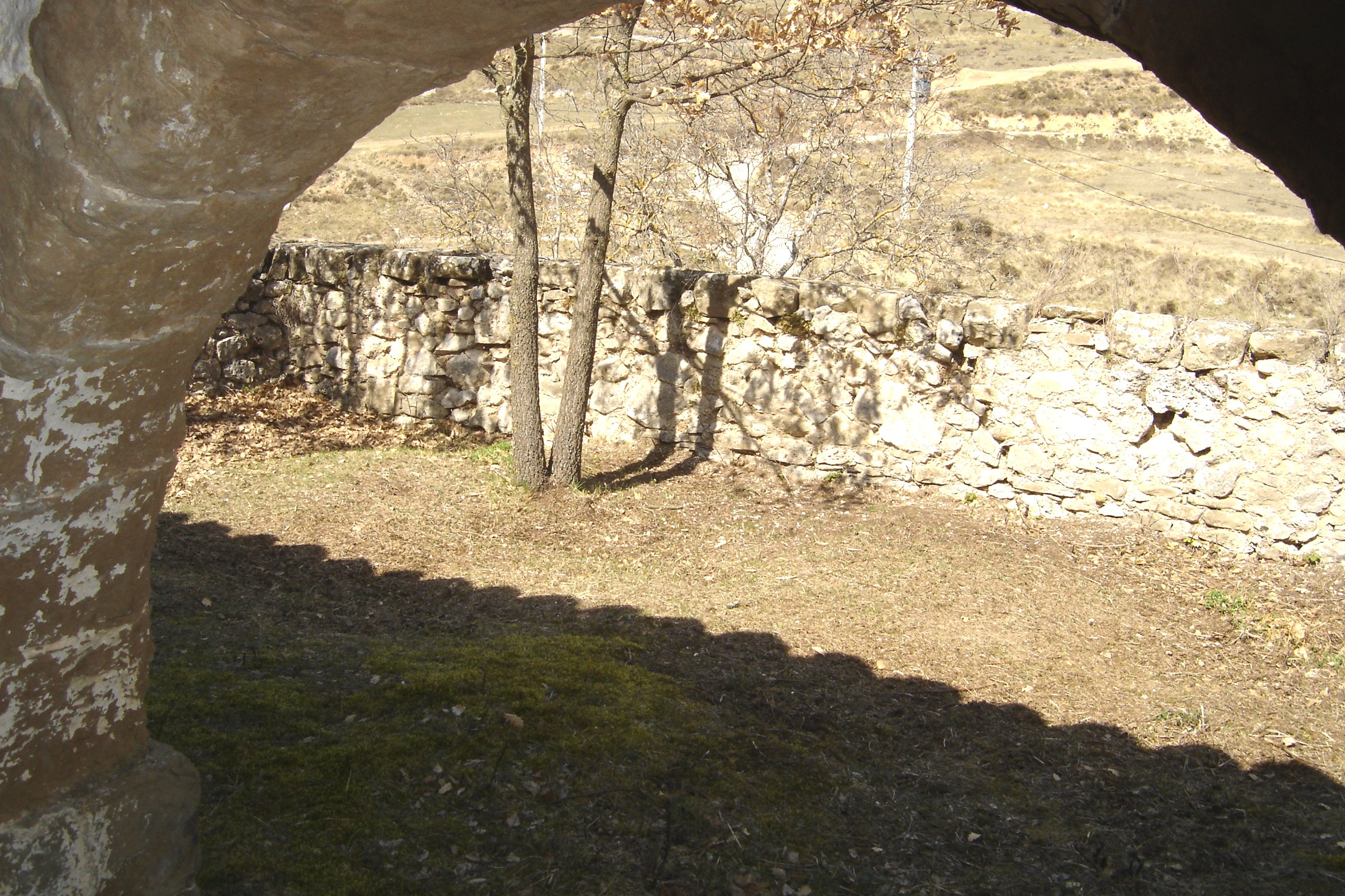 L'ermita de Sant Lleïr de Casabella, al municipi de La Coma i la Pedra, a la Vall de Lord (Solsonès). El cementiri vist des de l'interior del porxo.